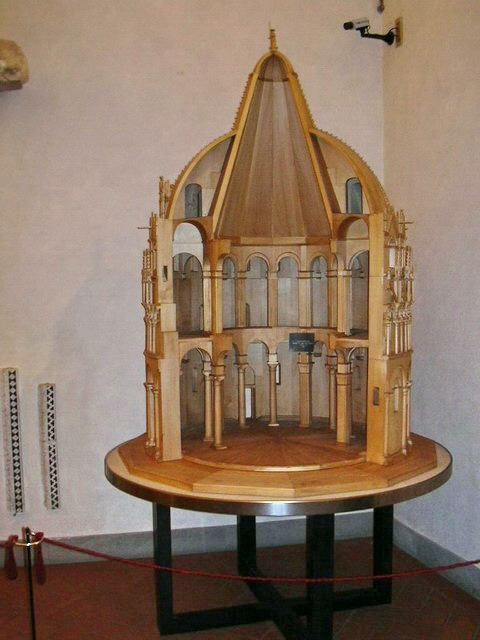 Modello in legno di Tiglio del Battistero, scala 1:31. Giancarlo Geri (1990)